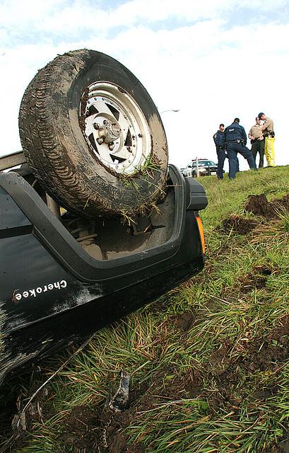 Boyd3